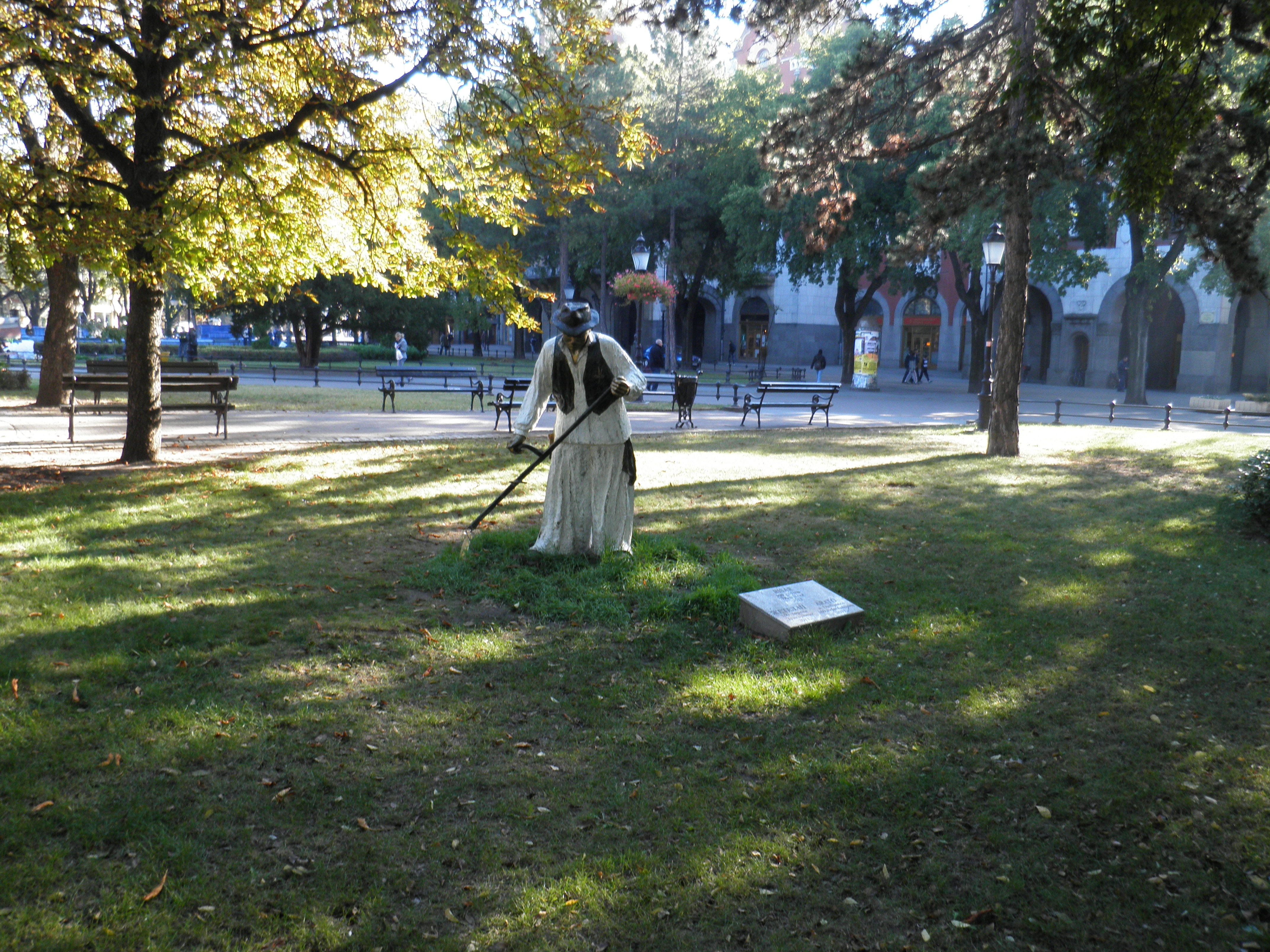 Spomenik Risaru